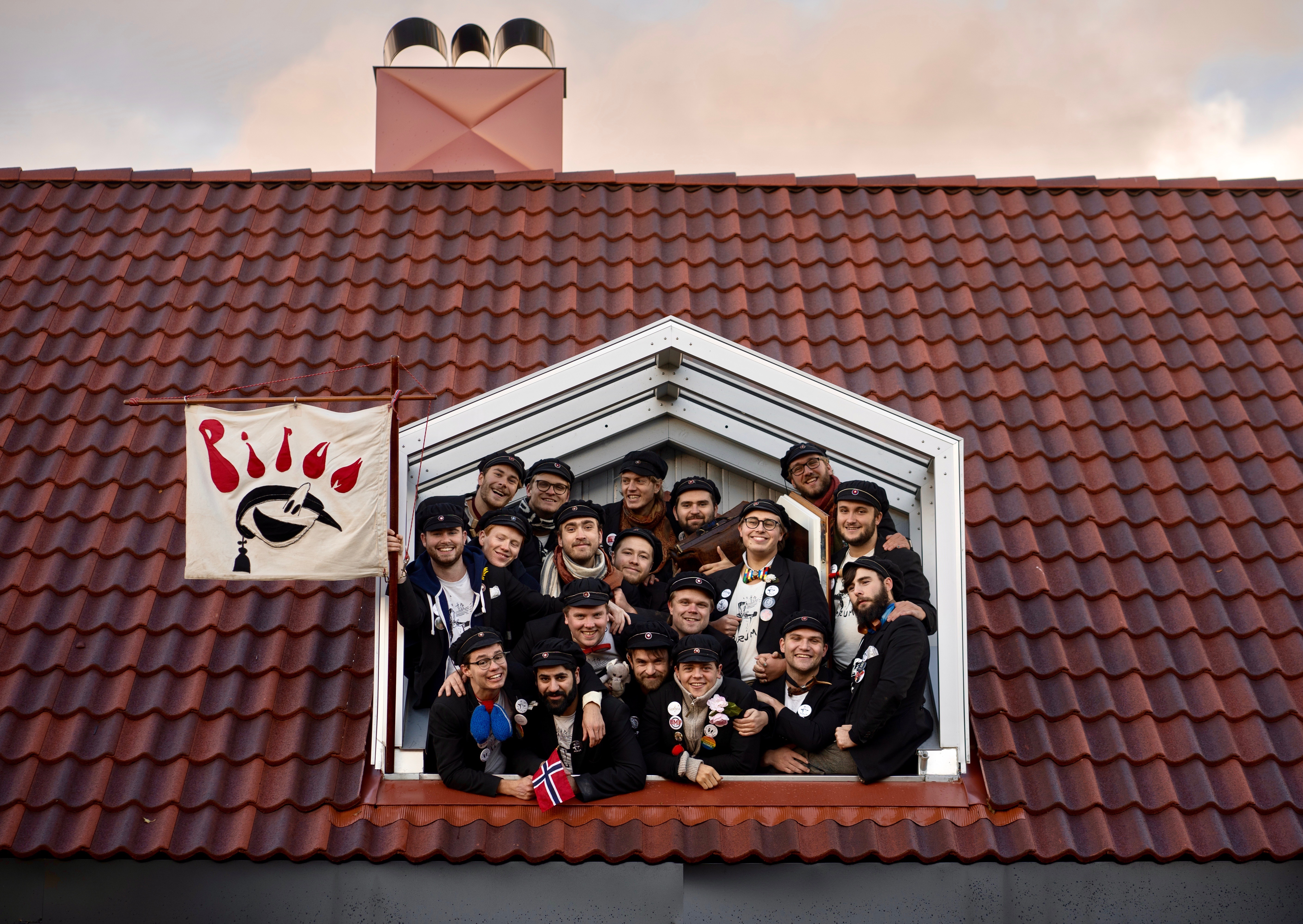 Pirum 17-2 samlet i balkongen til avdøde Margit «Mor» Dale, en bemerkelsesverdig figur i Pirums historie. Hver 17. mai synger Pirum Chicago bysang og Kampsangen (begge fra Dickie Dick Dickens hørespill) i det som var «Mor» sin hage, helst fra balkongen.